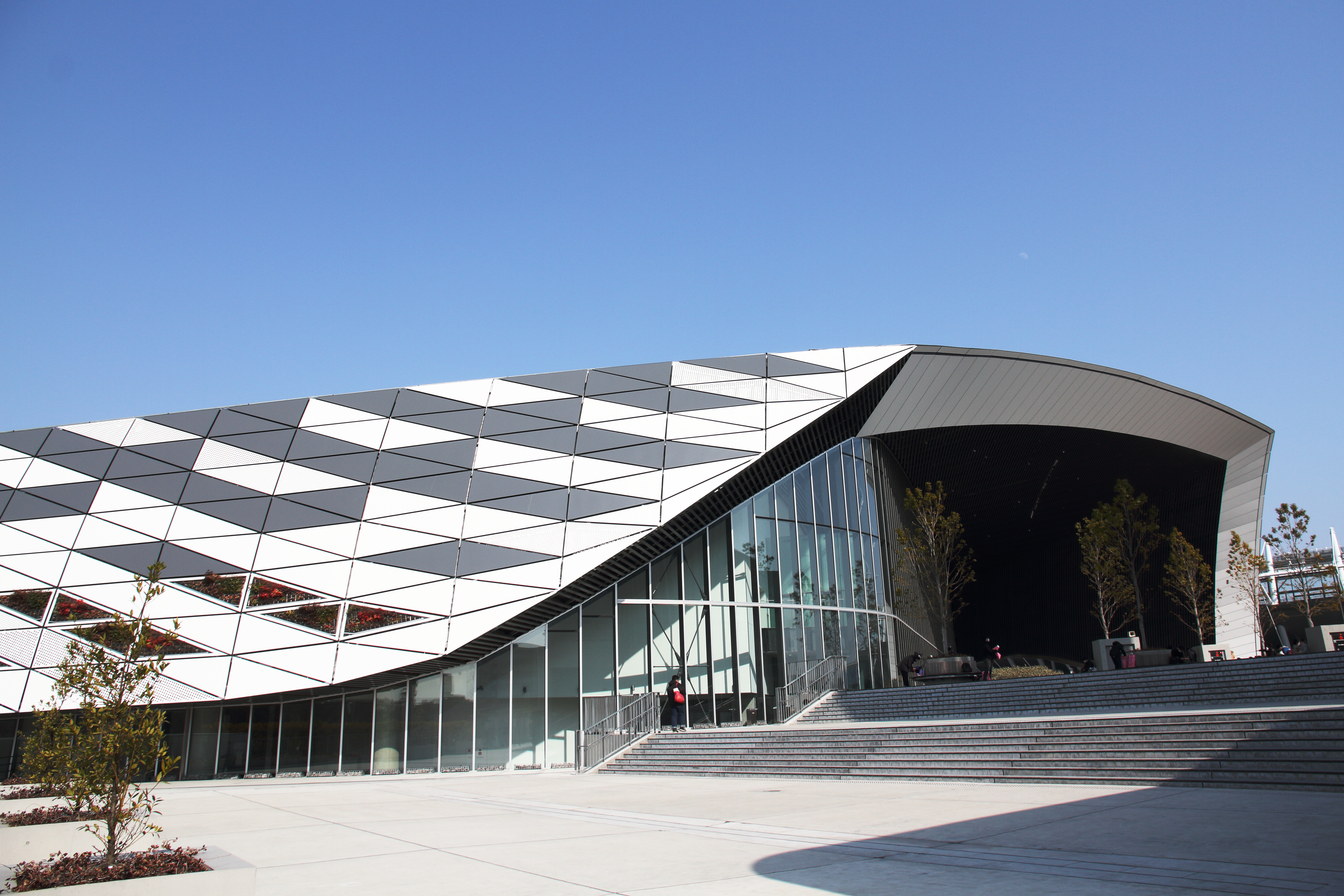 武蔵野の森総合スポーツプラザ。2018年2月24日撮影。